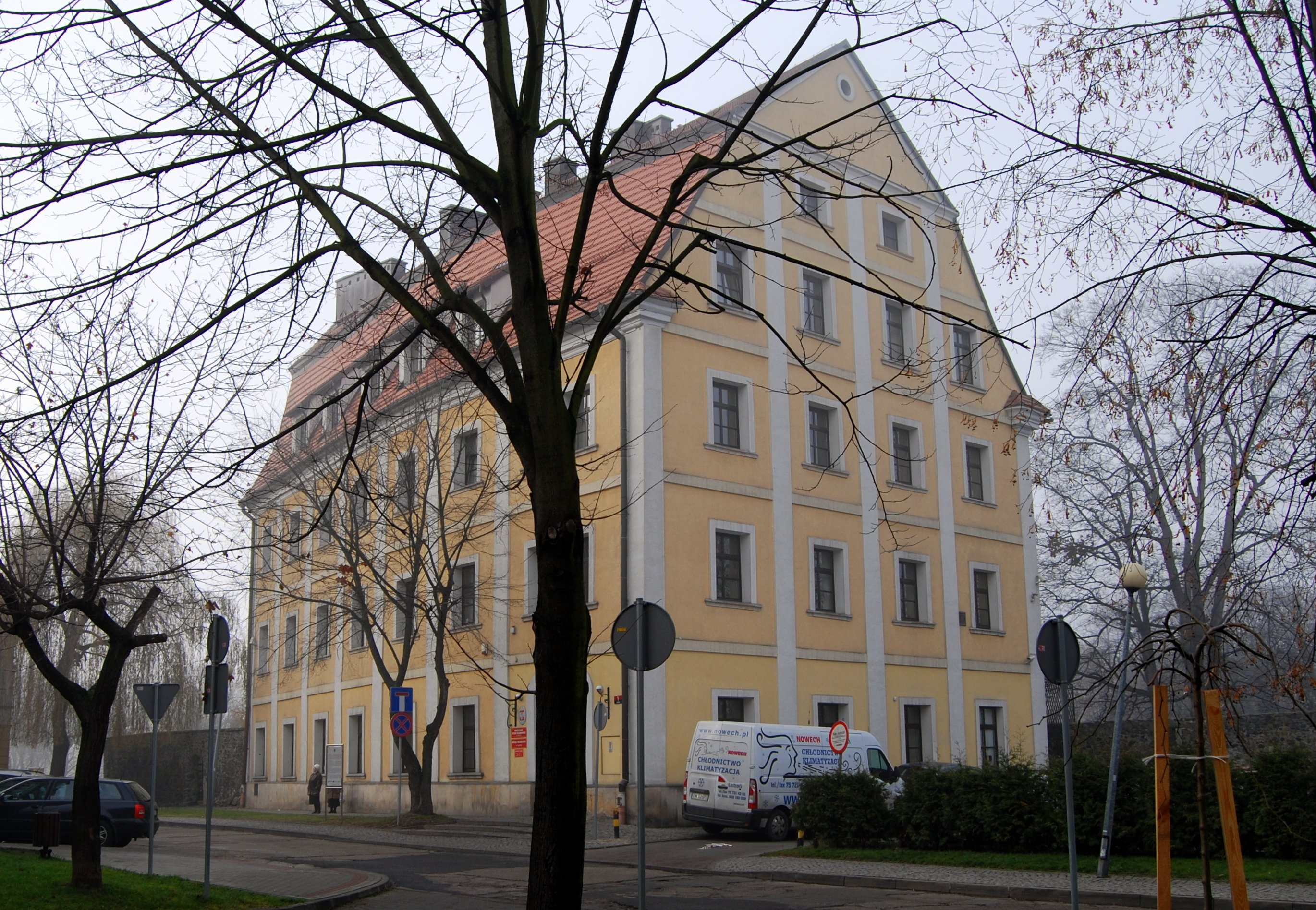 Lubań, ul. Stara 1 - dom "Pod okrętem", obecnie siedziba Urzędu Skarbowego (zabytek nr 604/95 z 03.12.1949)